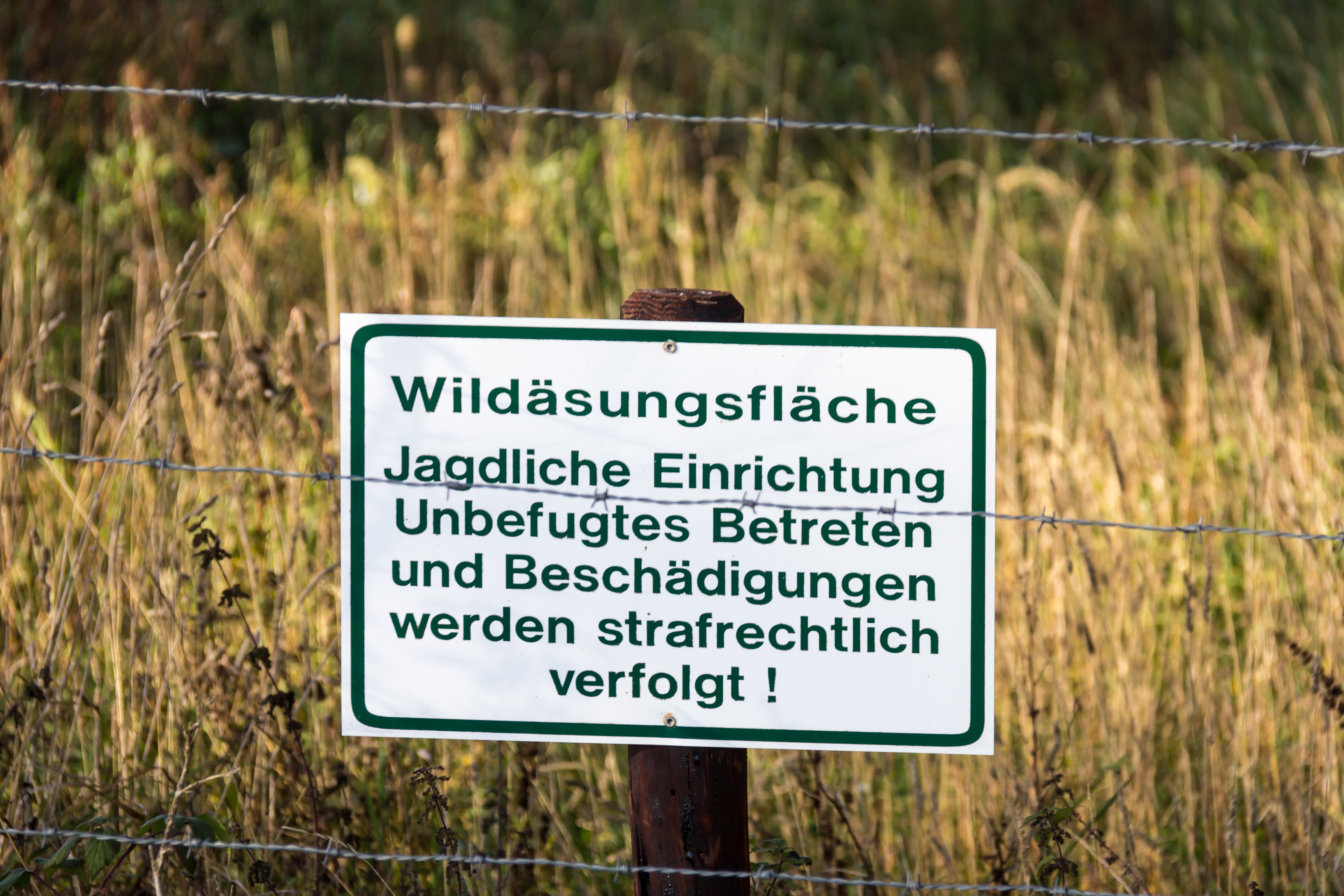 Wildäsungsfläche/Wildacker zwischen Nettersheim und Engelgau